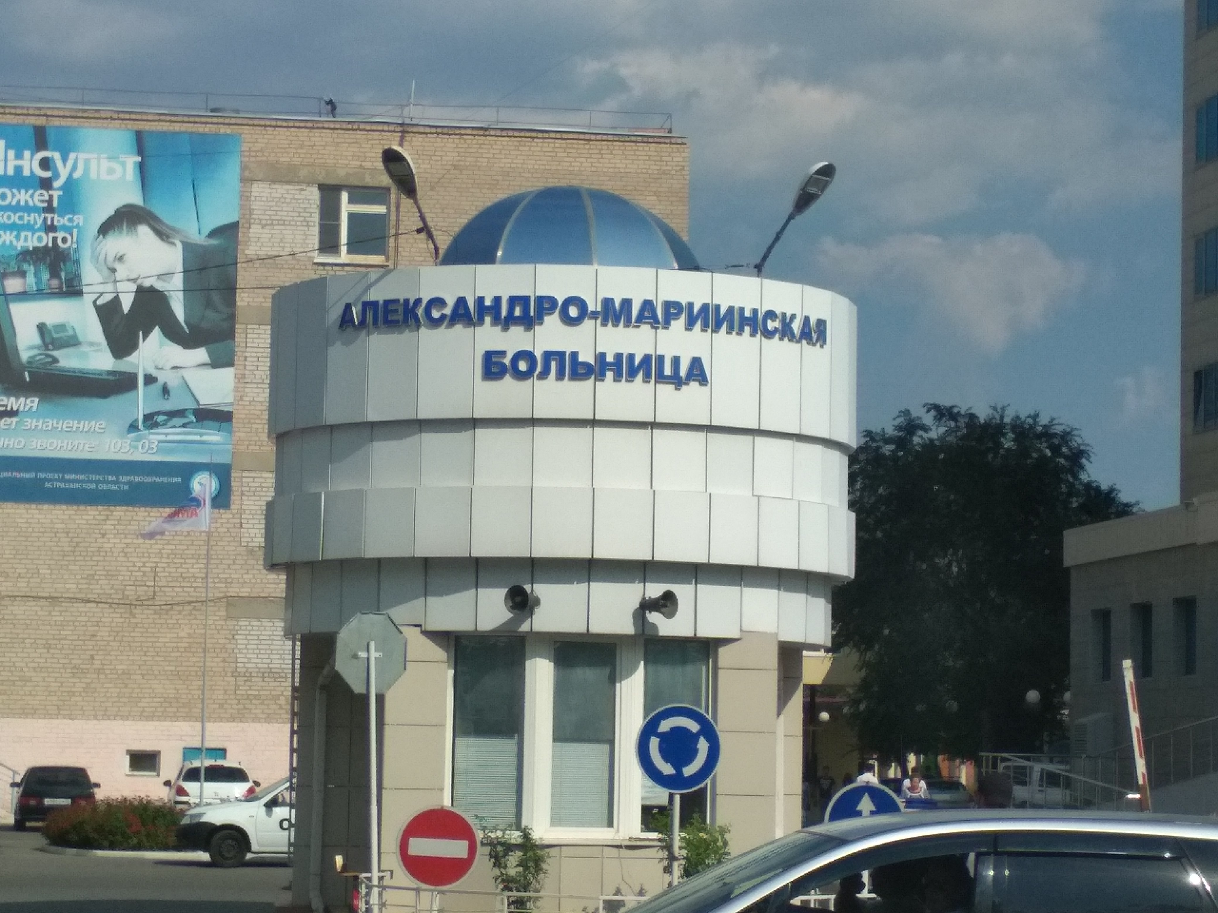 Нохчийн: Алесандро-Мариинская больница